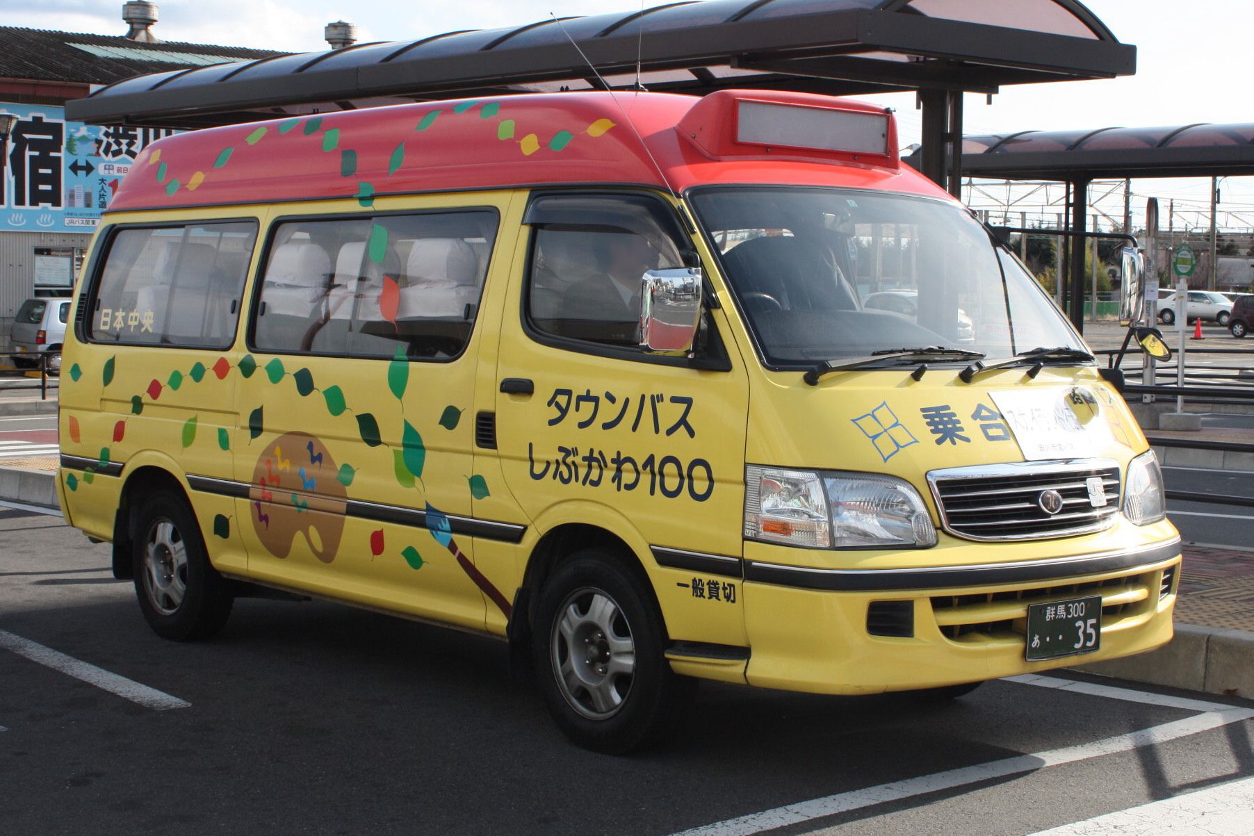 渋川タウンバス トヨタ・ハイエース